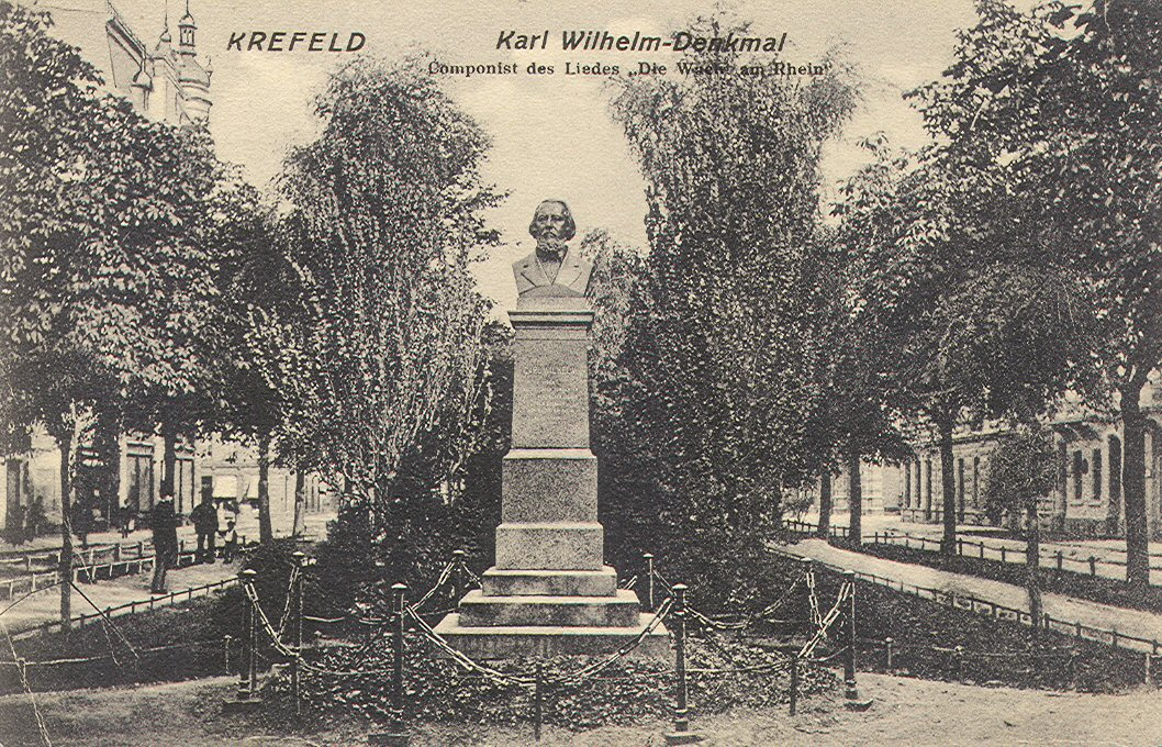 Das Karl Wilhelm-Denkmal in Krefeld, wo der Komponist der "Wacht am Rhein" von 1841 bis 1864 Dirigent der Liedertafel war.